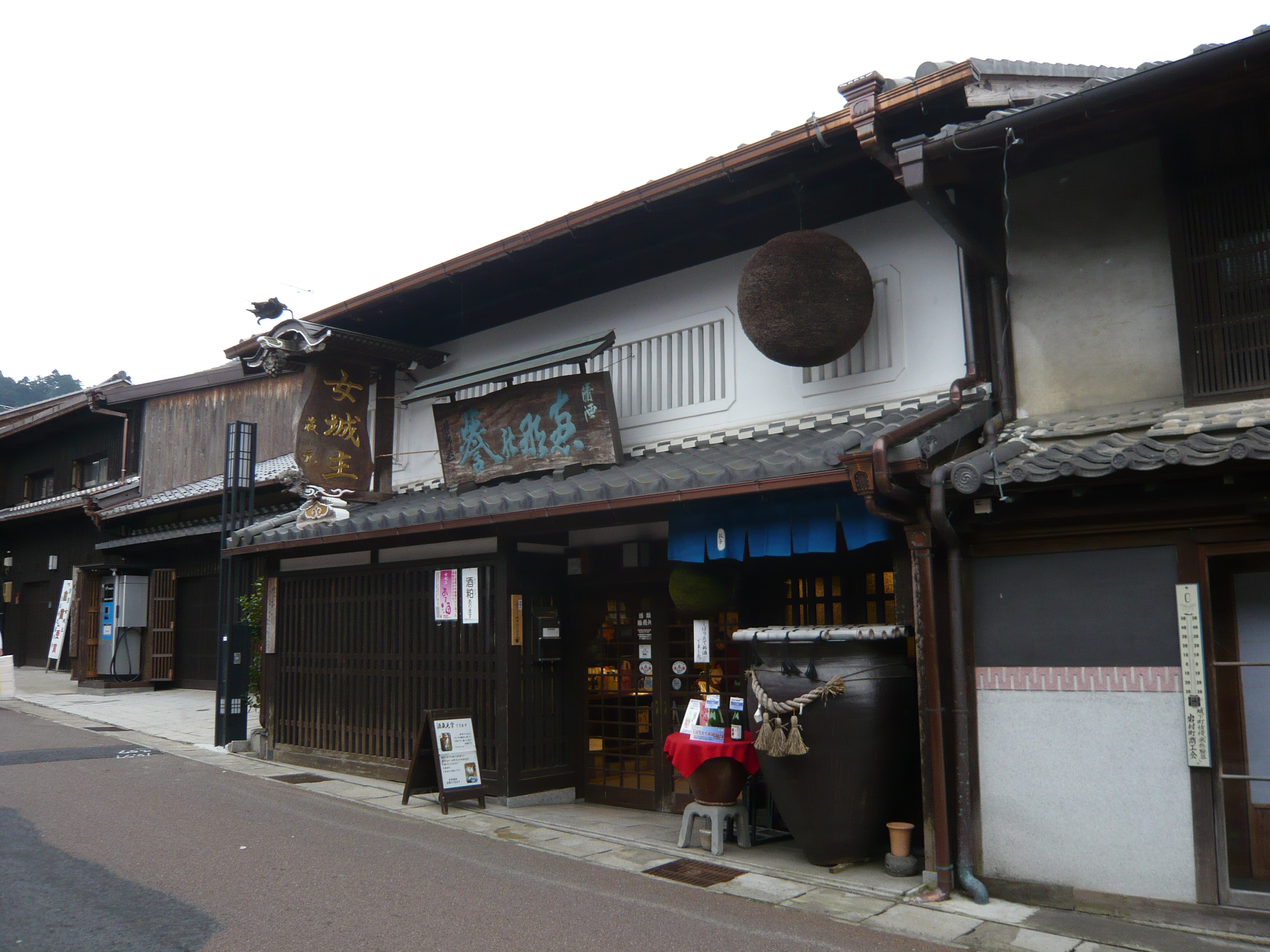 恵那市岩村町の岩村醸造